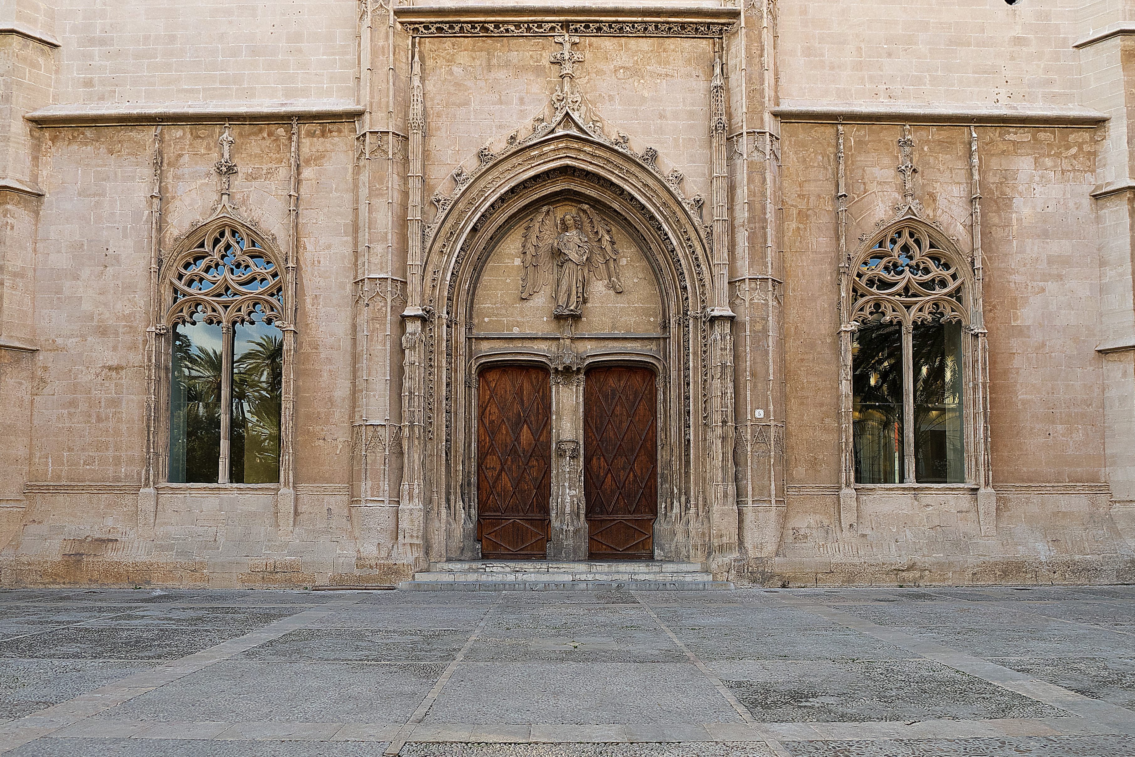 Guillermo Sagrera, maestro mayor de la Catedral de Mallorca, construye un centro para los mercaderes de la ciudad (1426-1448). Entre los principales ayudantes, los hermanos Vilasclar, y sus hijos Santiado y Antonio. Una importante obra de arte tardogótico español.